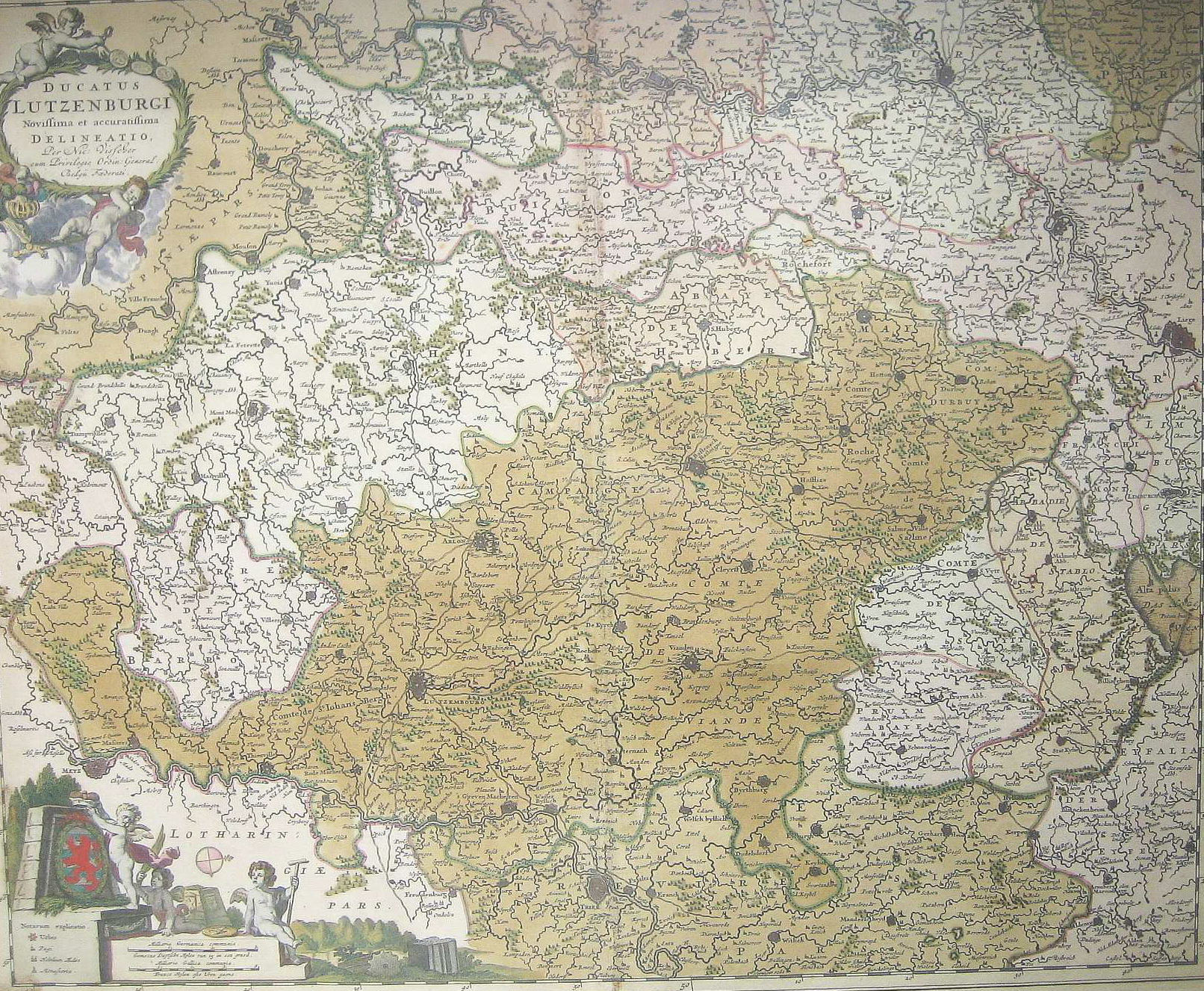 Kaart vum Herzogtum Lëtzebuerg. Opschrëft: Ducatus Lutzenburgi / Novissima et accuratissima / delineatio / Per Nic. Visscher / cum Privilegio Ordin. General. / Belgae Foederat. Kategorie:Herzogtum Lëtzebuerg